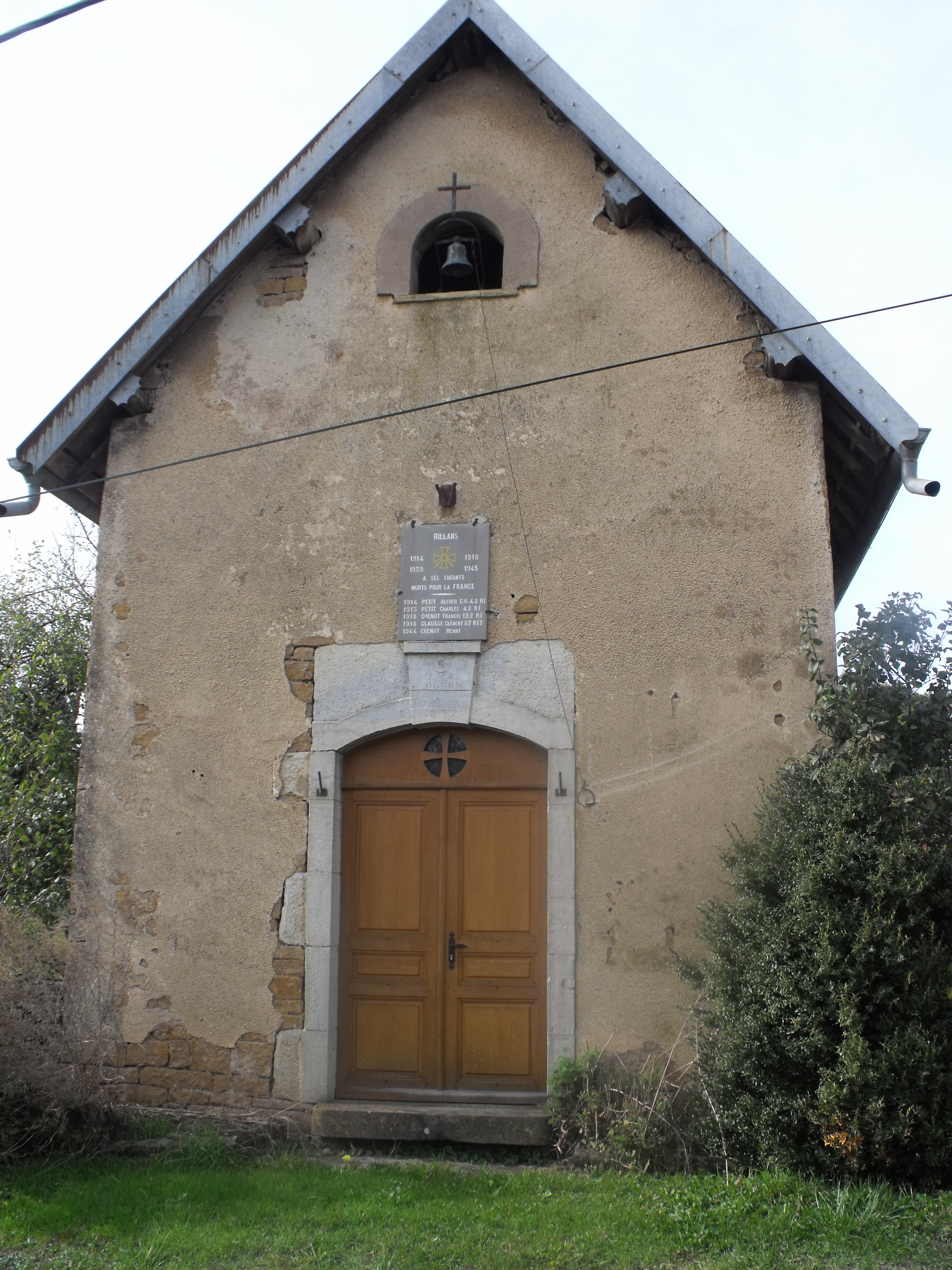 Chapelle à Rillans, Doubs, France